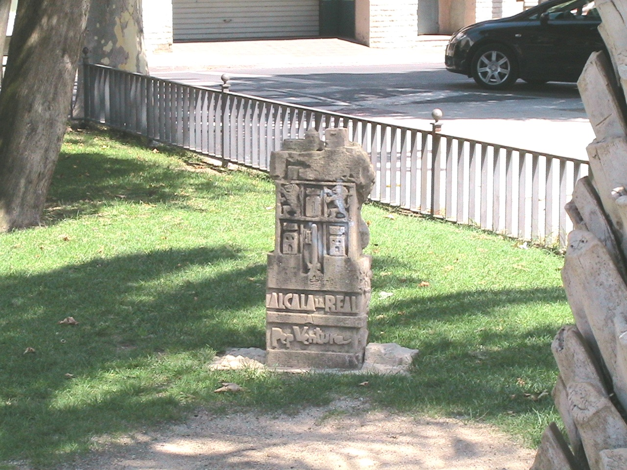 La Ciotat Pep Ventura, Plaça del President Josep Tarradellas, à Figuères (Gérone, Catalogne, Espagne)